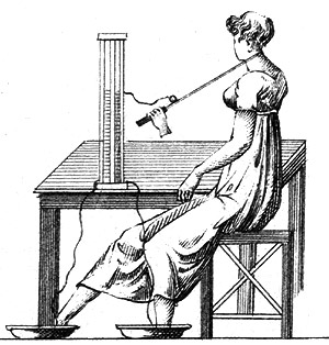 Een Zuil van Volta. Contents 1 Licensing 2 Original upload log 3 Licensing 4 Original upload log Licensing Original upload log The original description page was here. All following user names refer to nl.wikipedia. 2005-06-17 08:10 Michiel1972 300Ã—314Ã—8 (31354 bytes) wegens ouderdom PD PD